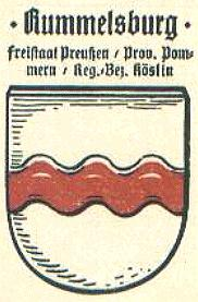 Altes Wappen von Rummersburg